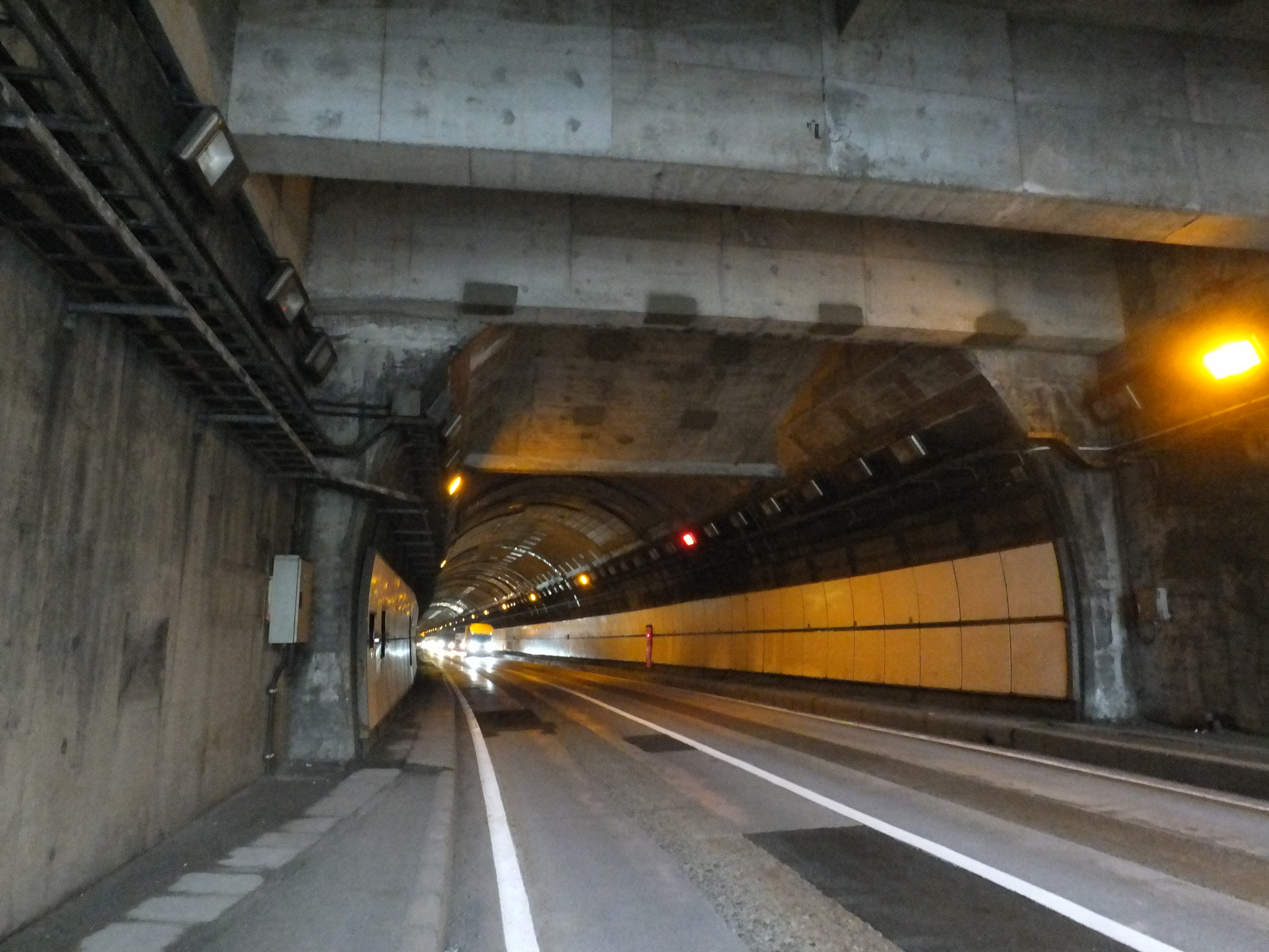 国道46号仙岩道路にある仙岩トンネルの岩手県側坑口